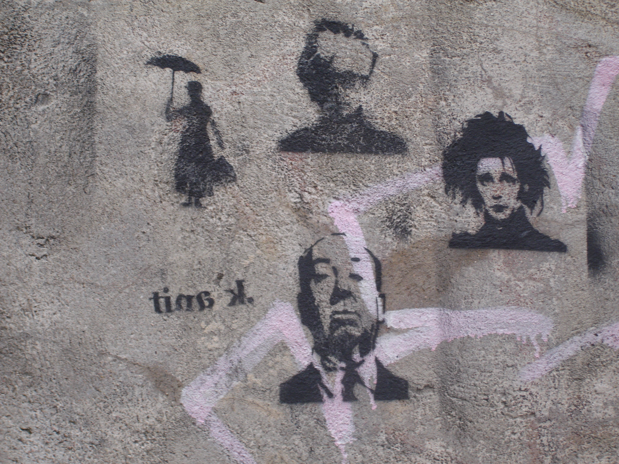 Dessins exécutés au pochoir à Lyon Les Pentes Croix Rousse.